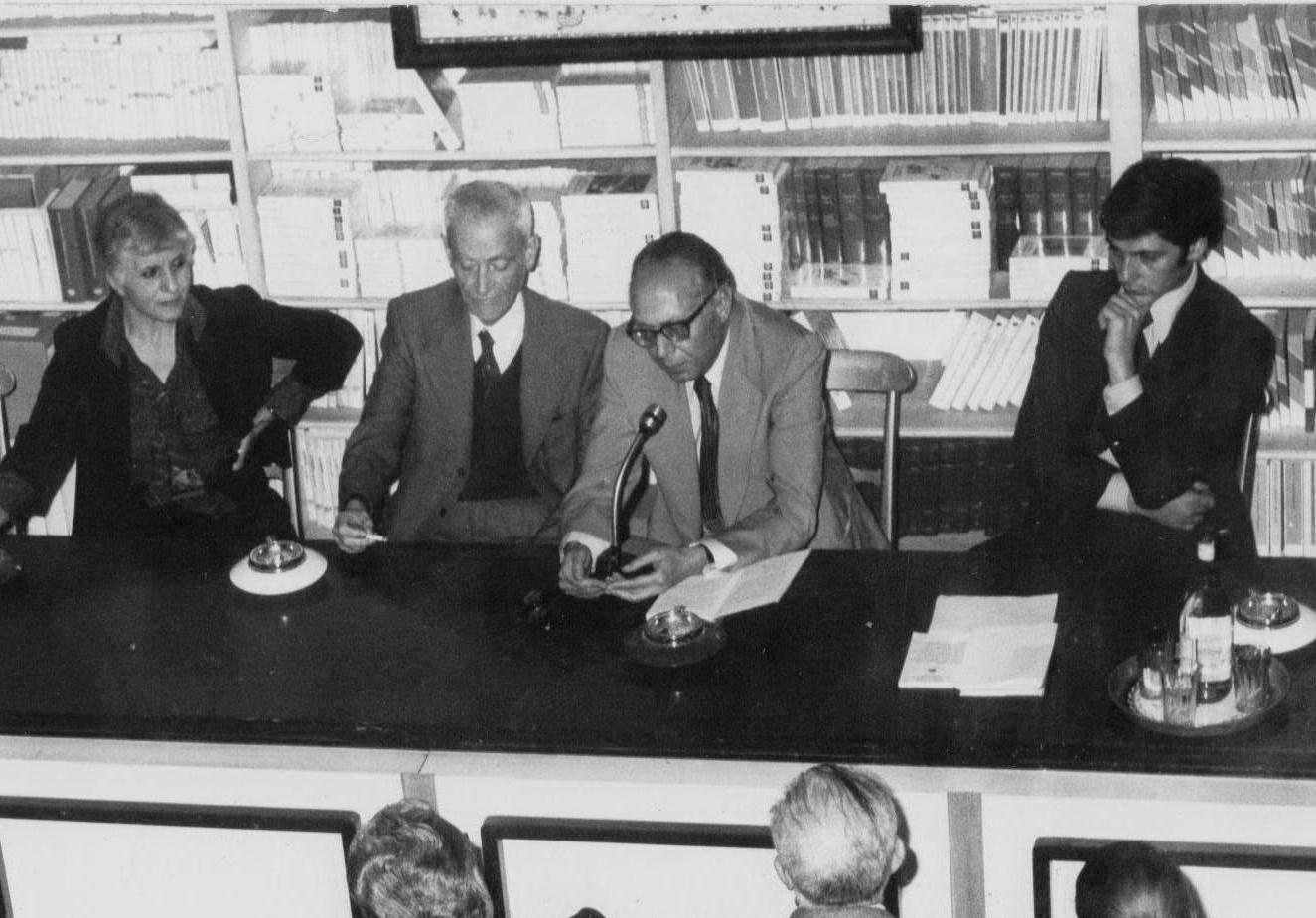 Roma, libreria Croce, 1976, presentazione libro "Lontano dal corpo", Italo Benedetti, GiacintoSpagnoletti, Giorgio Caproni e Graziana Pentic